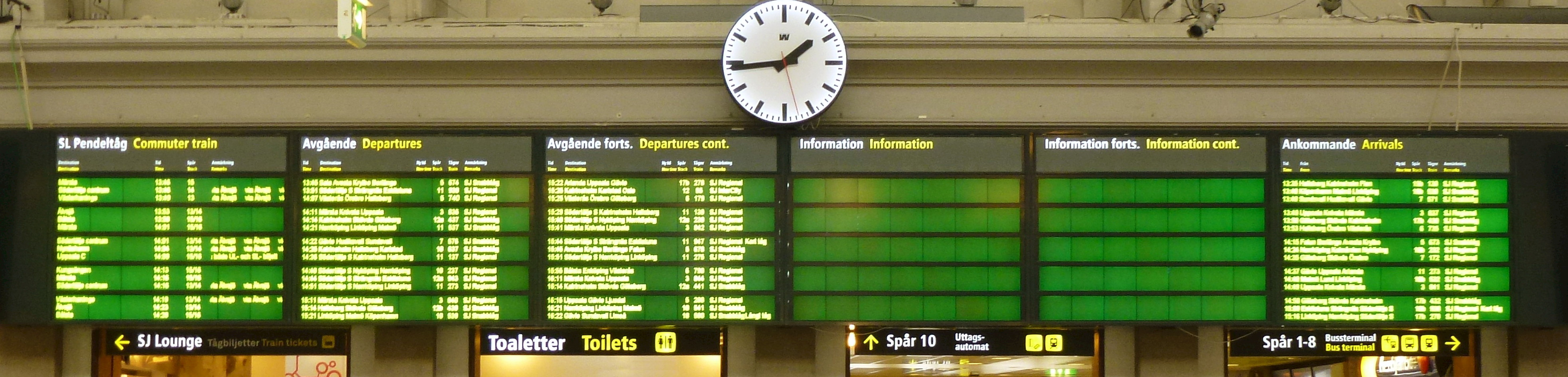 Centalen infotavla vänthallen